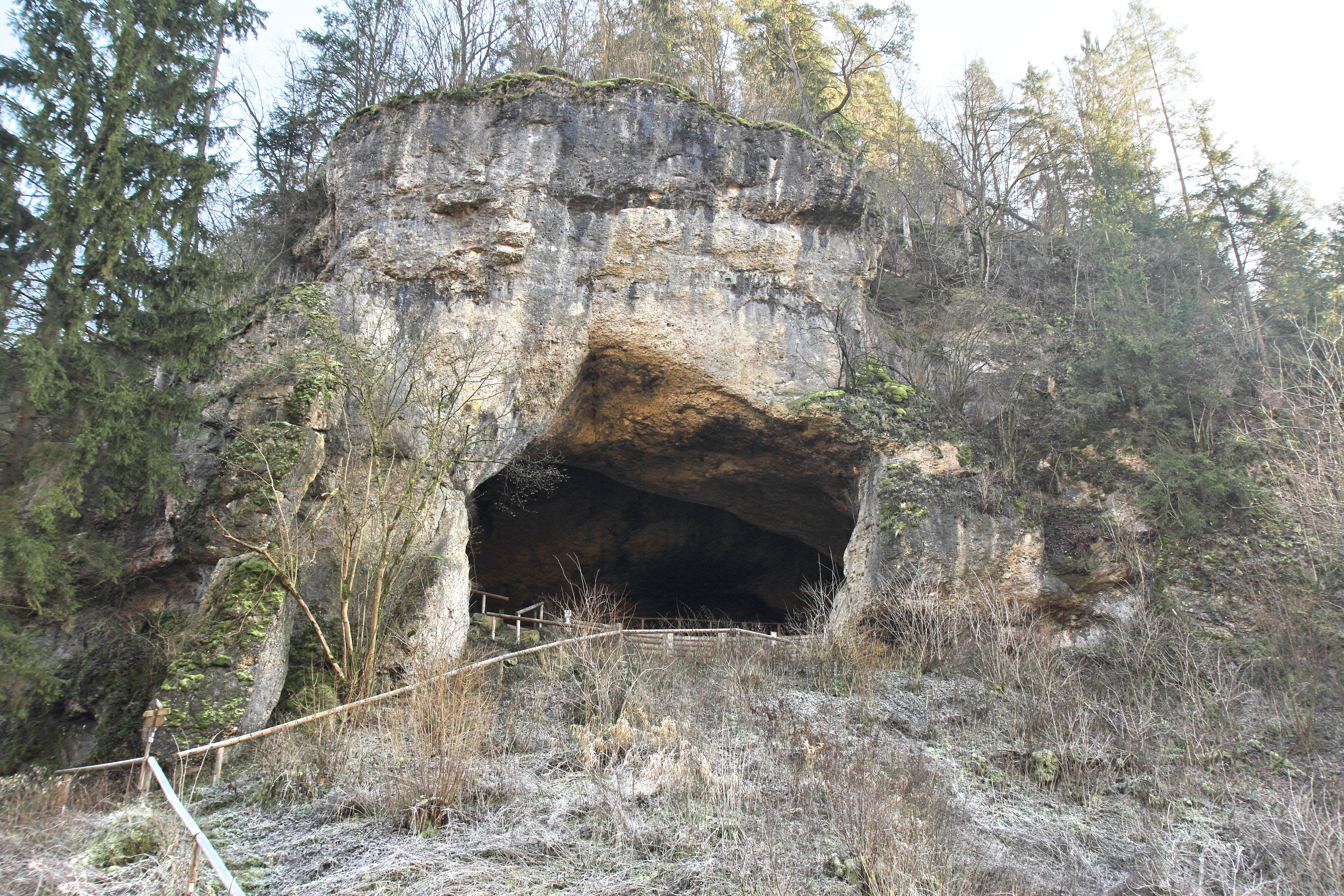 Bodendenkmal D-4-6134-0067: Umgrenzte Höhensiedlung vermutlich mit Abschnittsbefestigung der frühen Latènezeit sowie Höhle mit vorgeschichtlichen Funden und Ludwigshöhle (B 26)